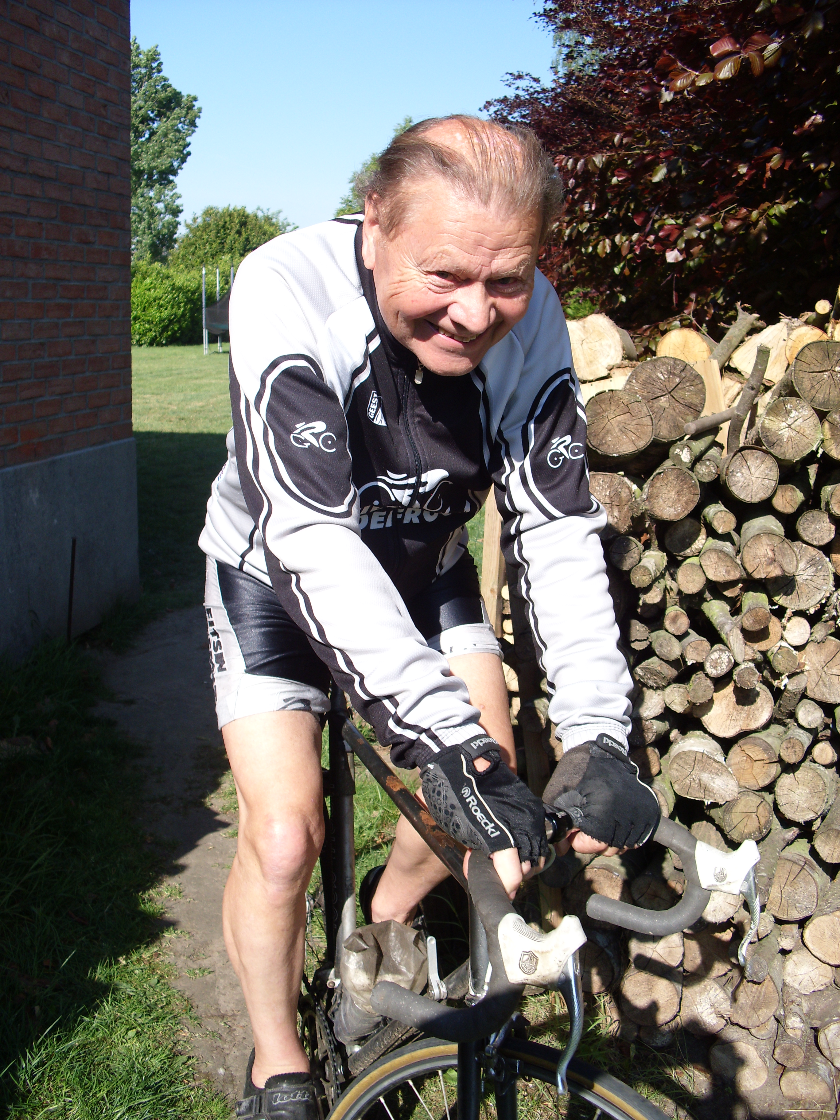 Arthur De Cabooter wordt op 3 oktober 2011 75 jaar, alle dagen fiets hij nog 40 kilometer.